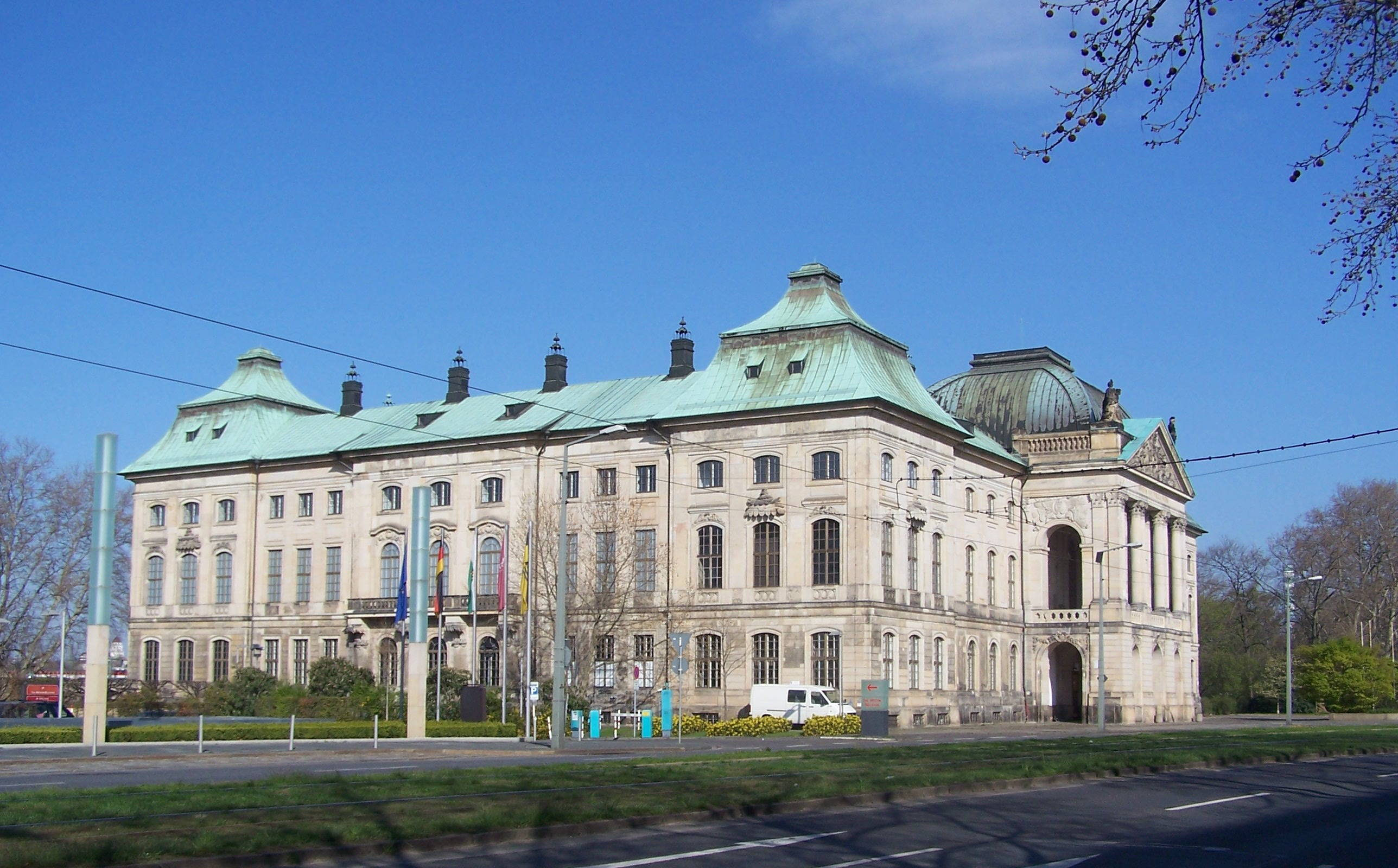 Japanisches Palais in Dresden